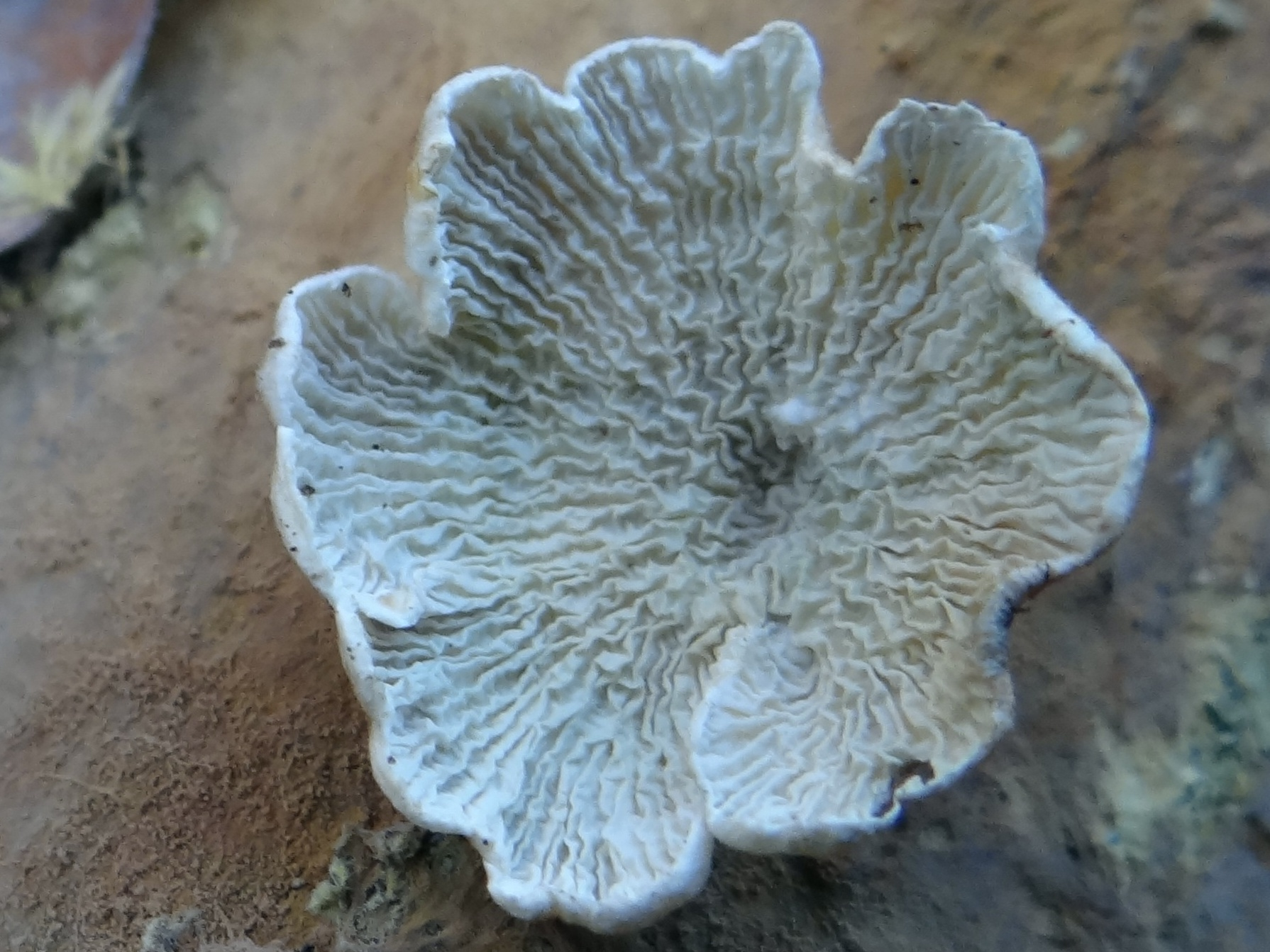 Plicaturopsis crispa